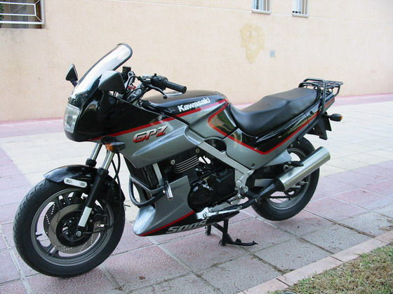 Moto Kawasaki modelo GPZ500S del año 1993 comprada en España. Lleva como accesorios no originales, un portaequipajes trasero y un candado tipo "pitón" que se ve sujeto en la parte delantera del motor, junto al radiador.